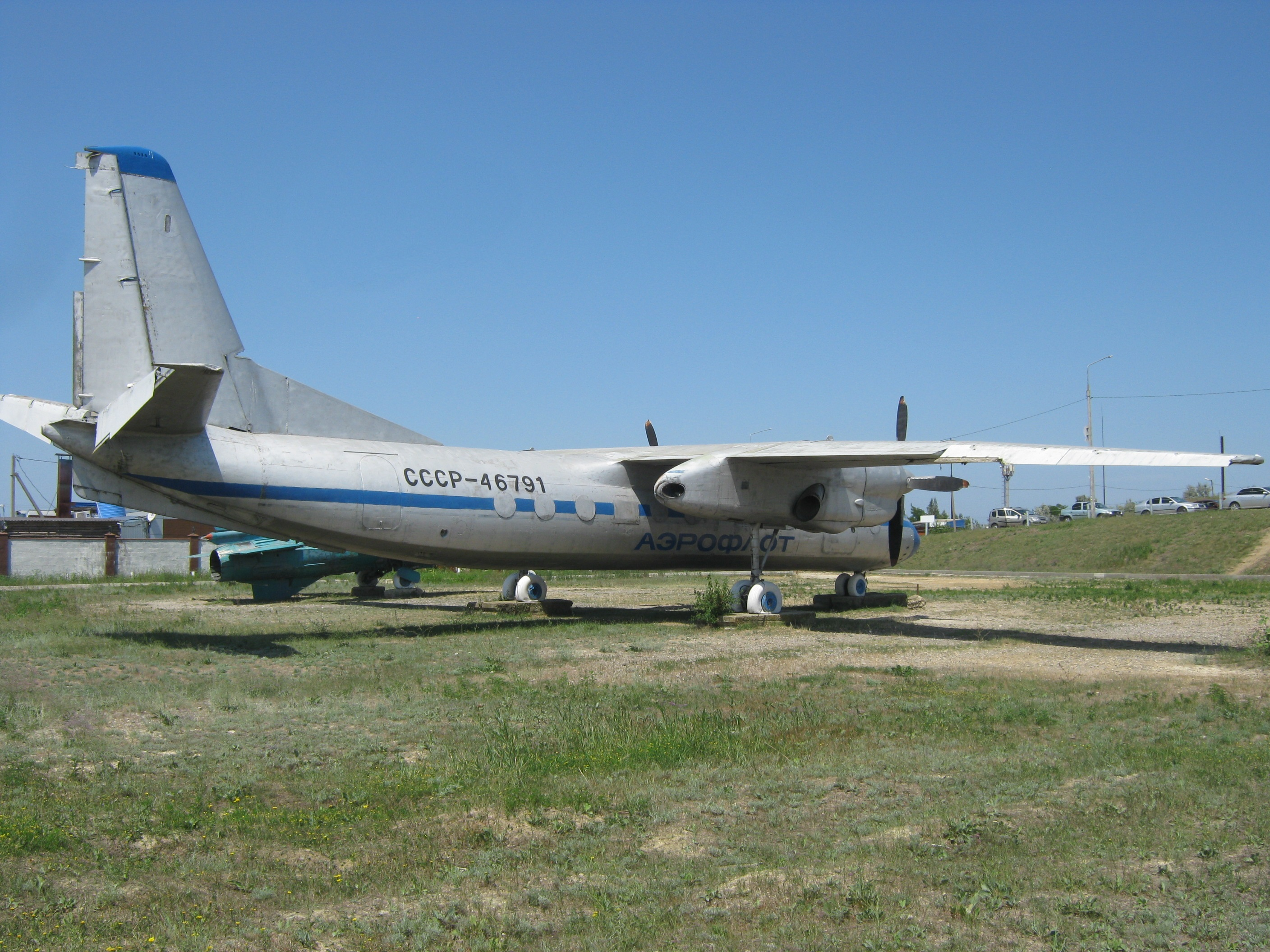 Военная горка (Темрюк)